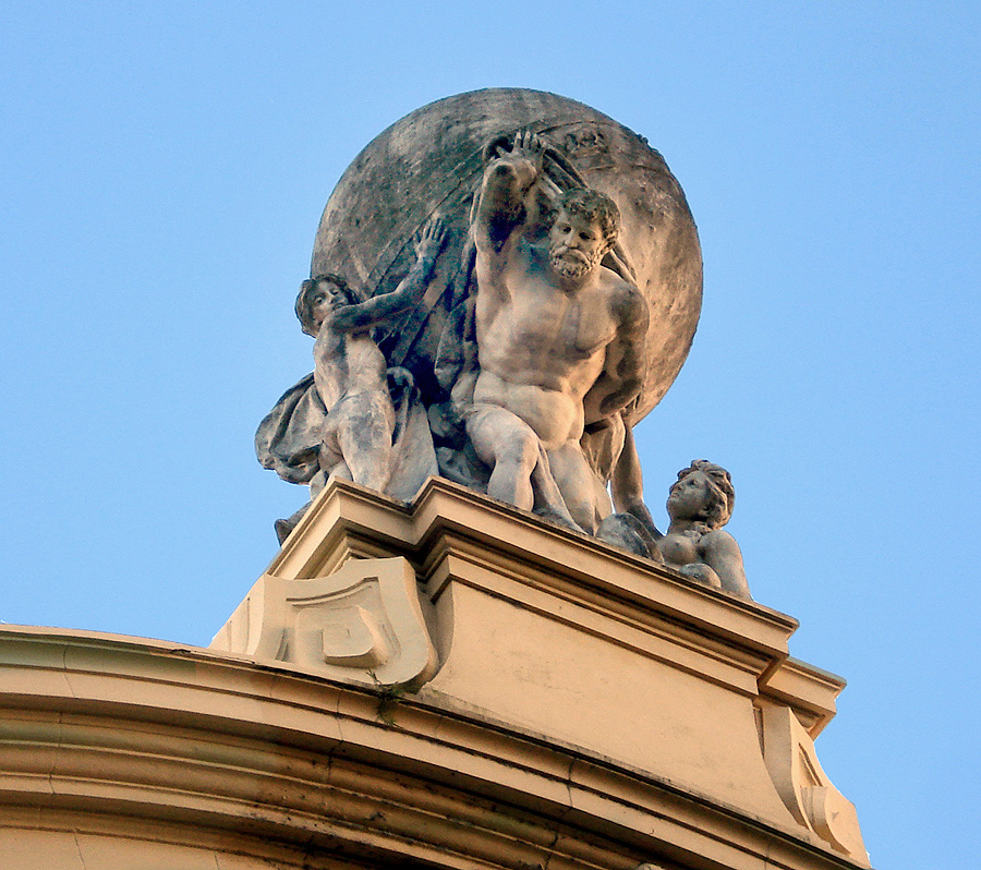 Grupo do Atlas no prédio do Memorial do RS, Porto Alegre,Brasil. Obra de Wenzel Folberger